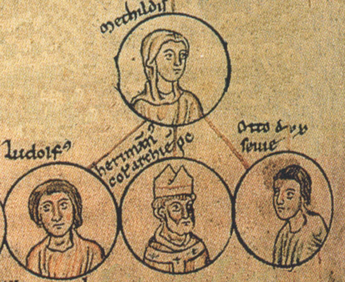 Mathilde (Lothringen)